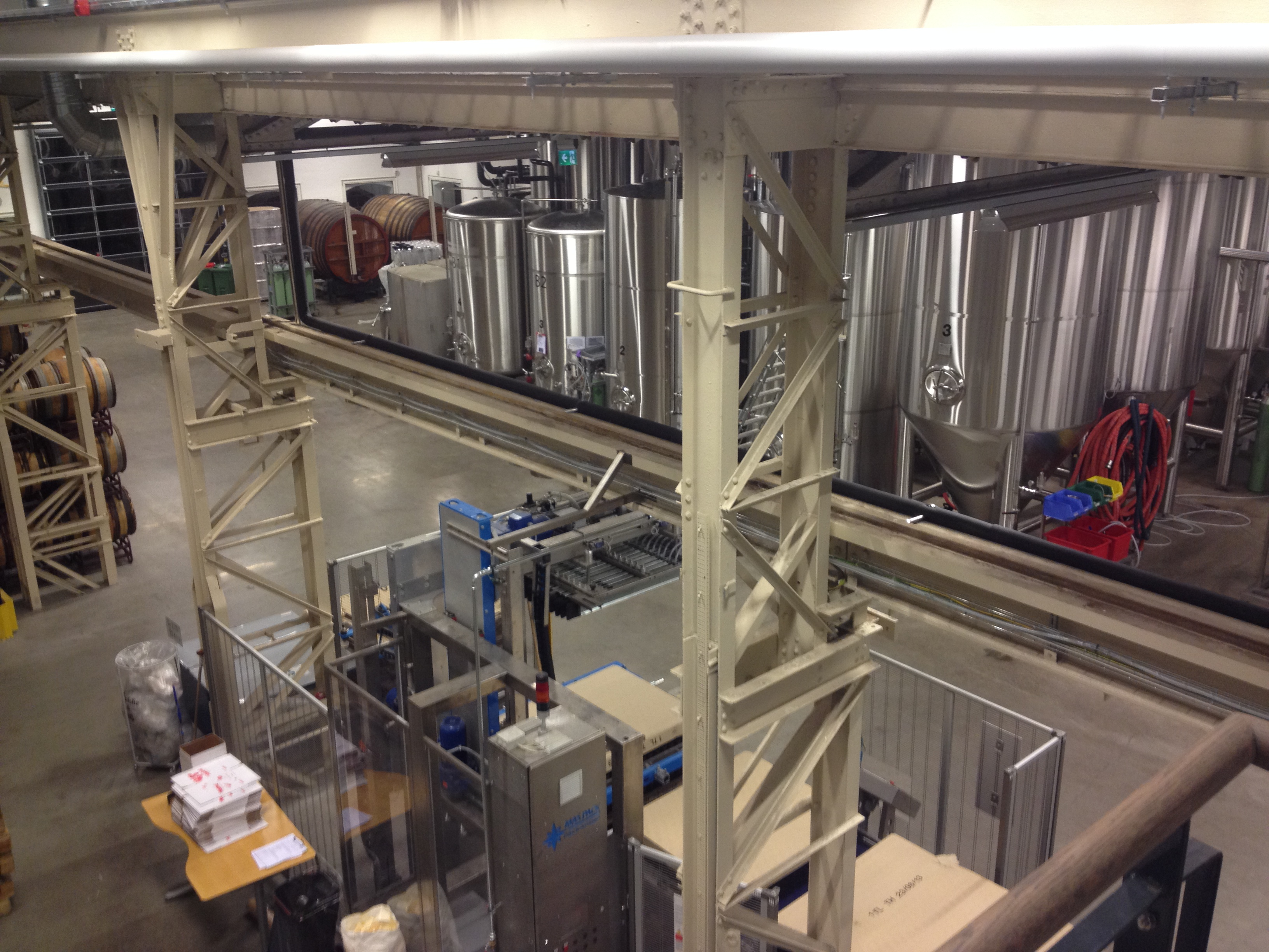 Fra Haandbryggeriets lokaler i Drammen.